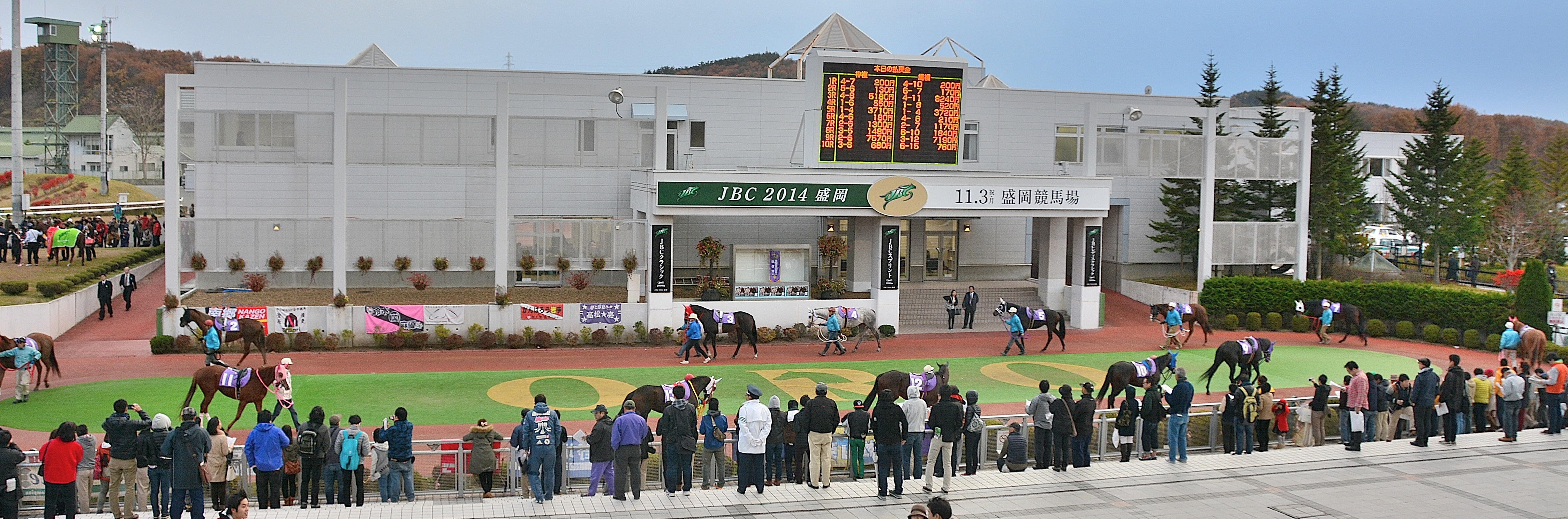 盛岡競馬場のパドック全景を、観客席から撮影したもの。撮影タイミングは2014年11月3日の第11競走「秋嶺賞」の出走前に、パドックを出走各馬が周回しているところ。写真左奥に映っている緑色の馬着を着装している馬は、前走第10競走の「第14回JBCクラシック」で勝利したコパノリッキー。